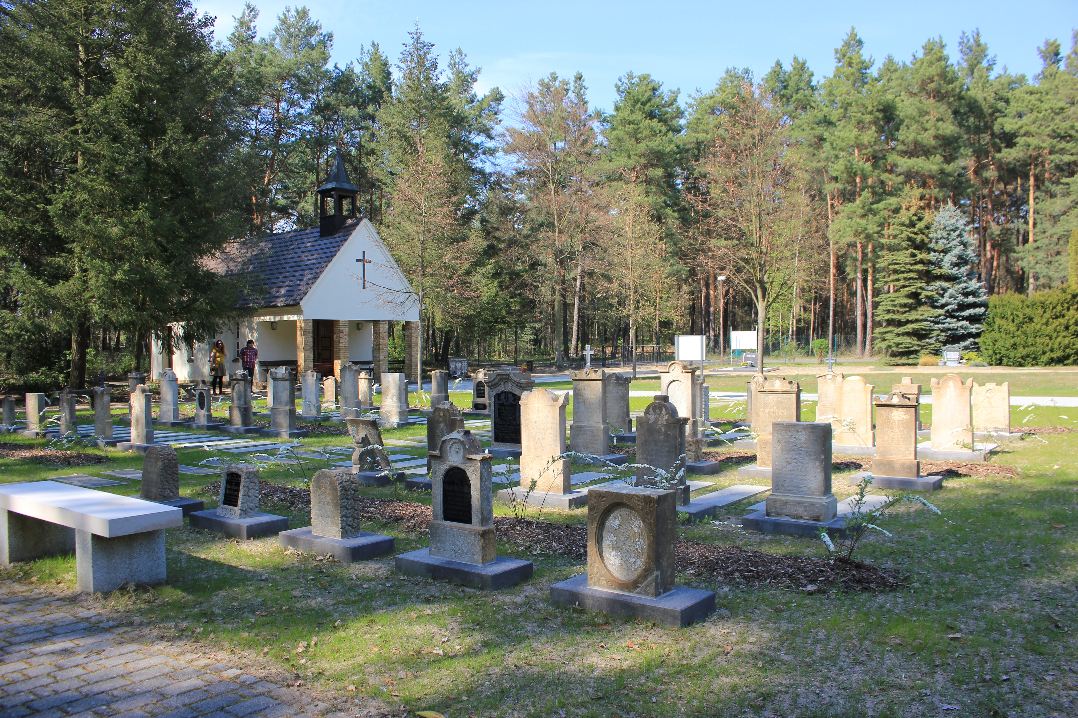 Hornjoserbsce: Stary narowny kamjeń ze serbskim napisom na Rownjanskim kěrchowje